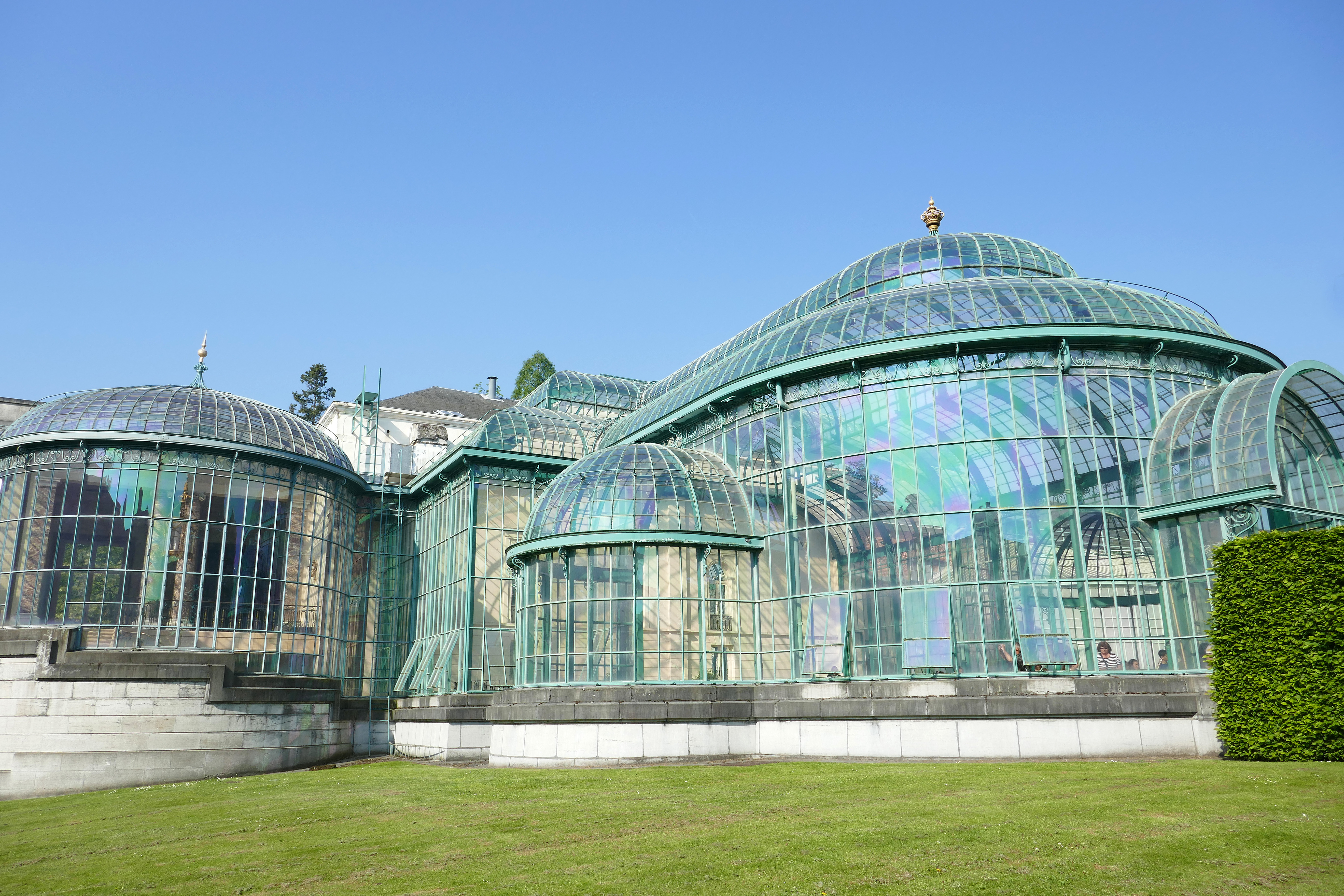 Serres royales de Laeken (Belgique), 2018.